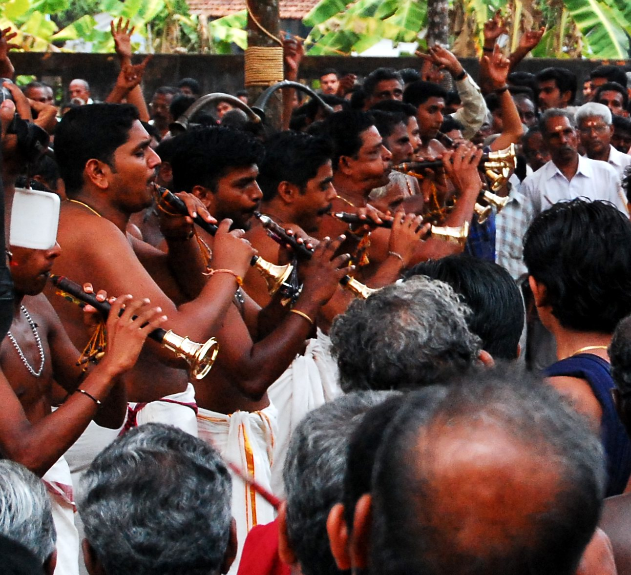 കുഴൽ(വാദ്യം)